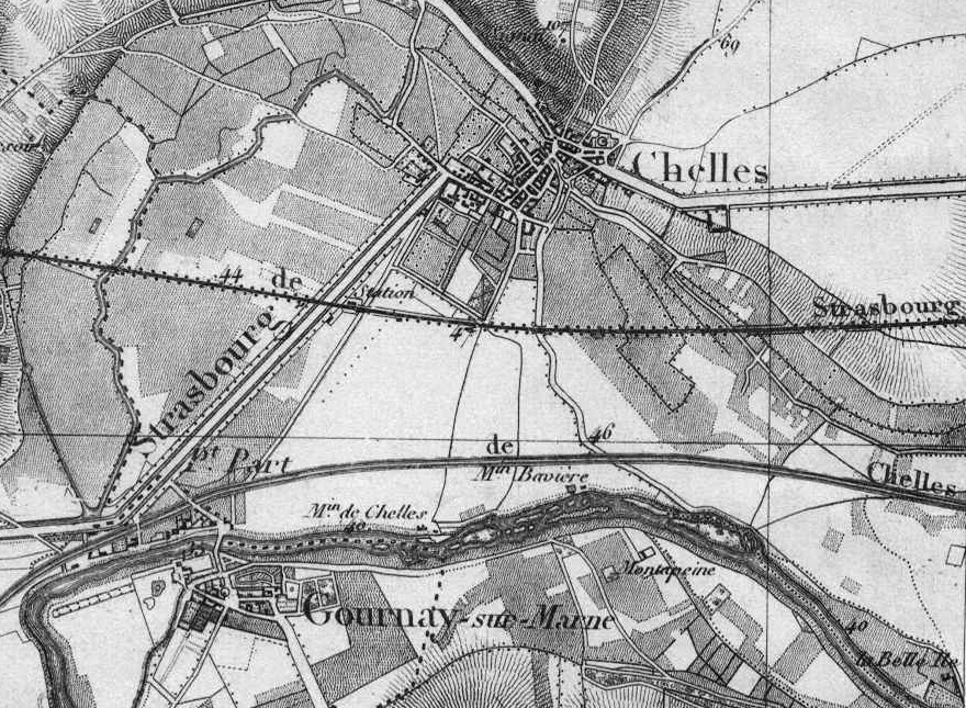 Extrait détail carte de 1939 mise à jour en 1857 avec le tracé du chemin de fer de Paris à Strasbourg et l'emplacement de la station de Chelles.